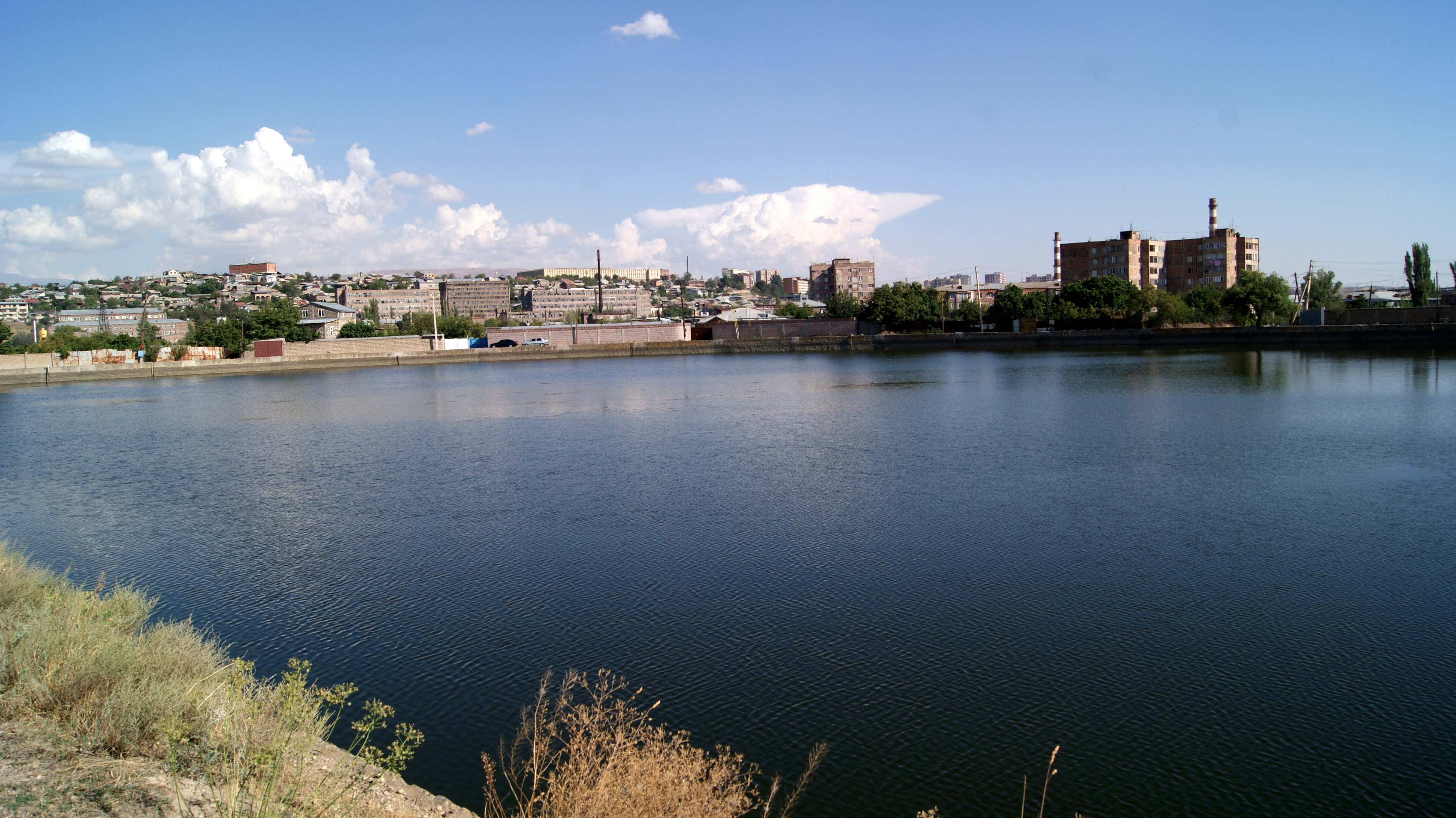 Քանաքեռ ՀԷԿ-ի ջրամբար 3/5